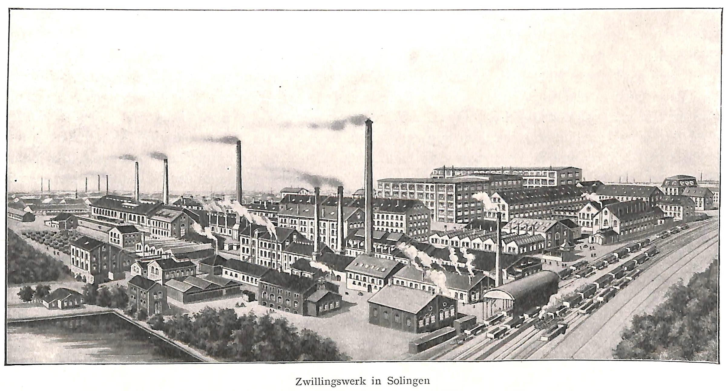 (fiktive) Werksansicht der Solinger Zwillingswerke.